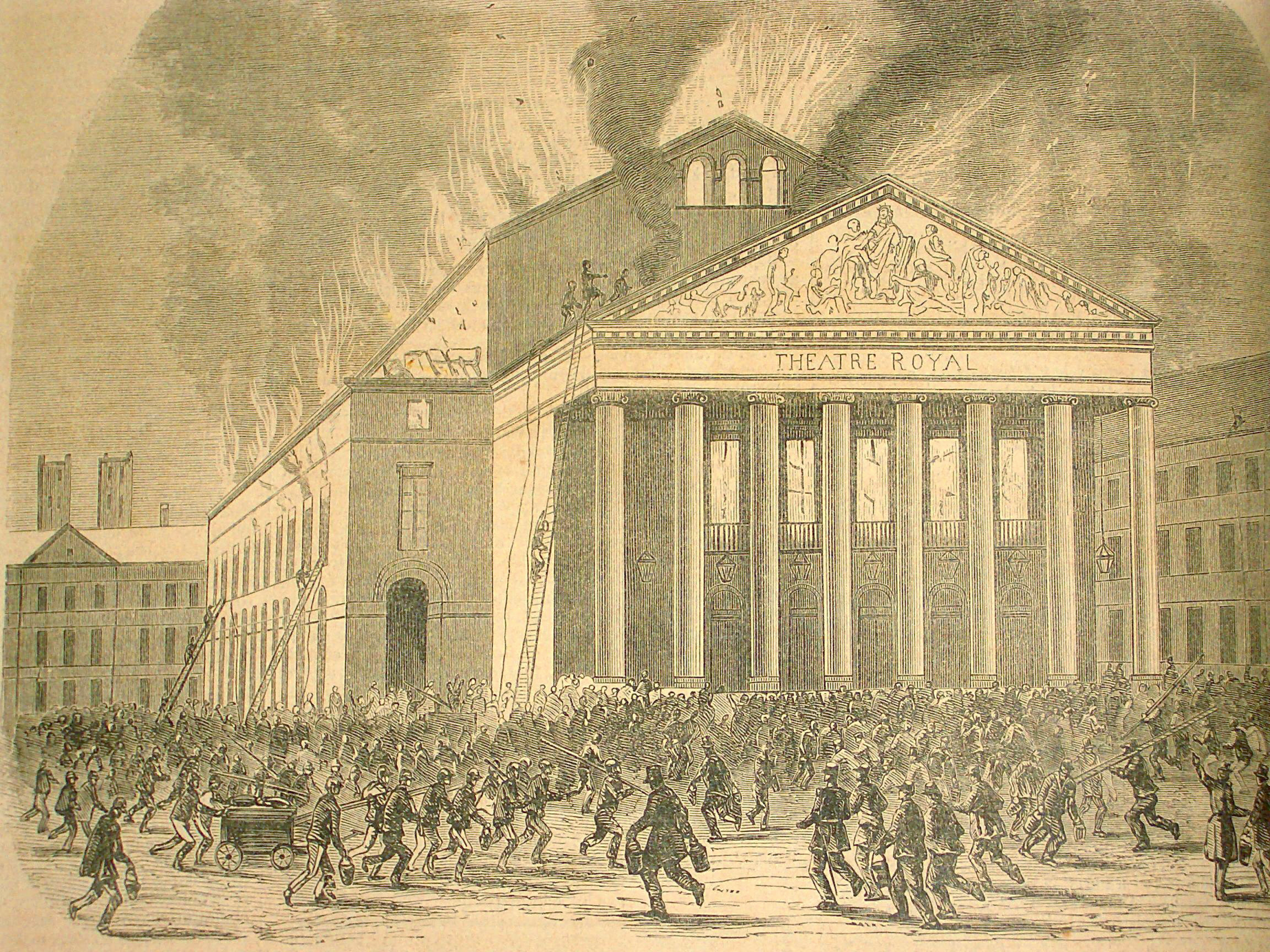 Teatro de la Monnaie, l'incendio del gennaio 1855, incisione